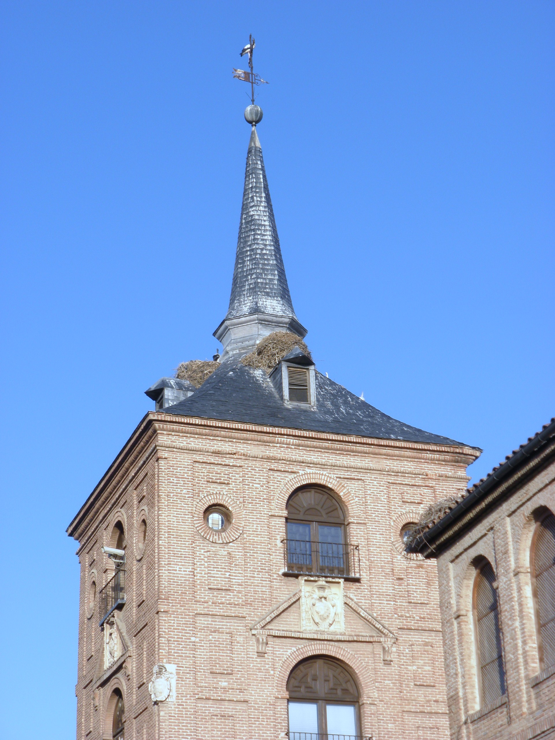 Colegio de Málaga. Alcalá de Henares, España.